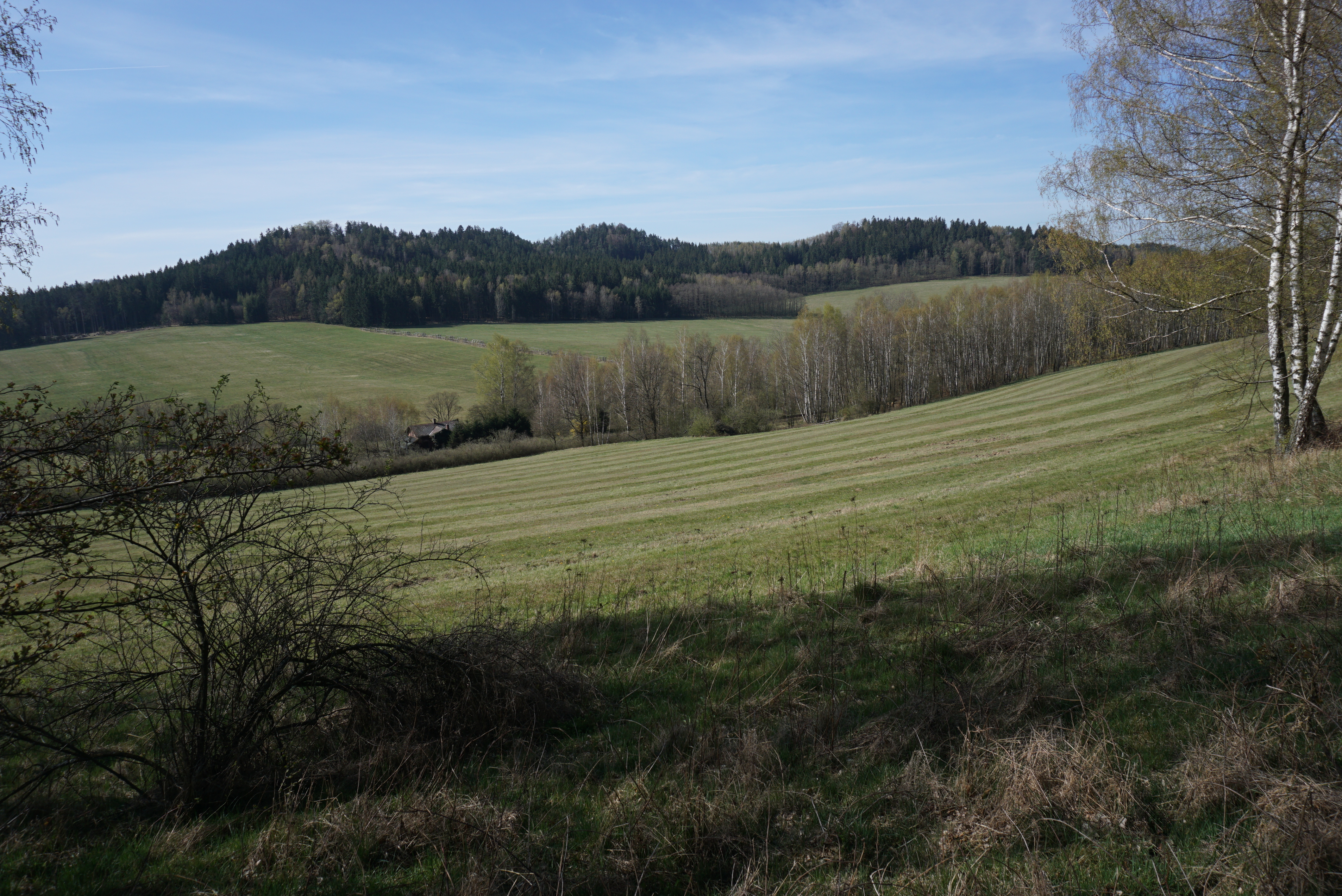 Pískové návrší (Sand-Berge, 485 m) u osady Nová Starost - pohled od SV